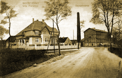 Górzyca - młyn parowy i willa Prenzlow (przełom XIX i XX wieku).